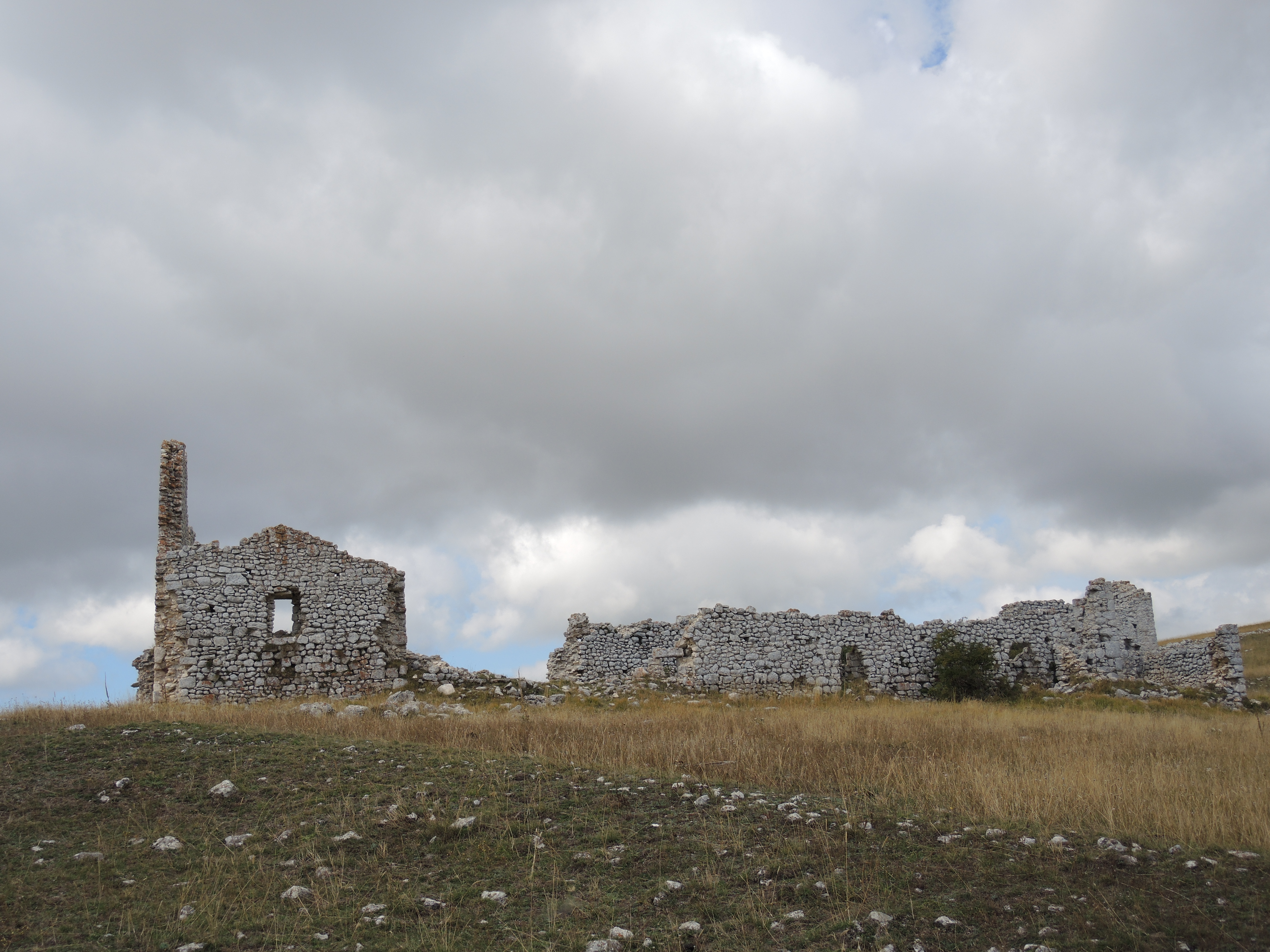 Campo Imperatore (AQ) - Monastero di Santa Maria del Monte